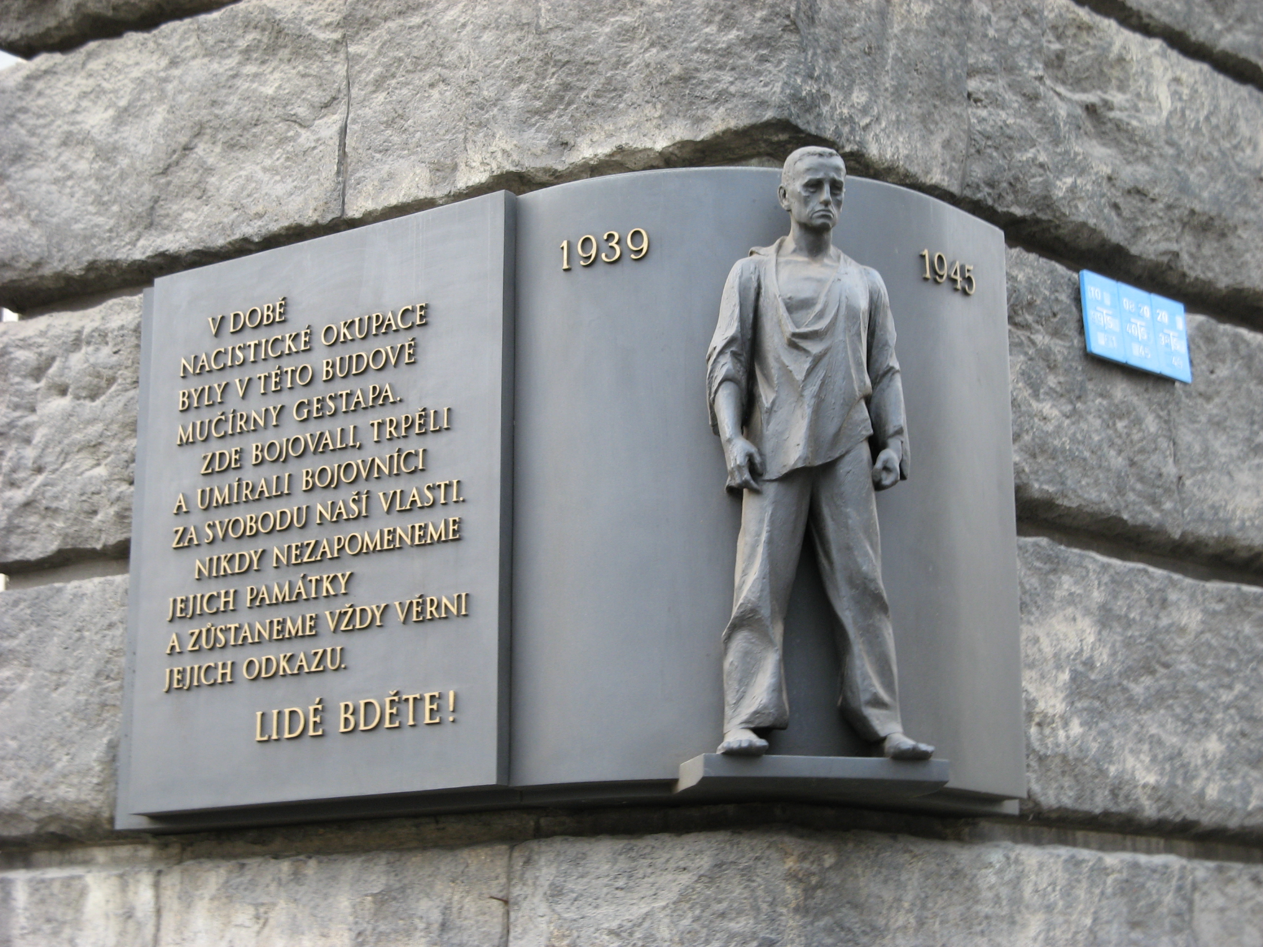 Pamětní deska na Petschkově paláci v Praze.